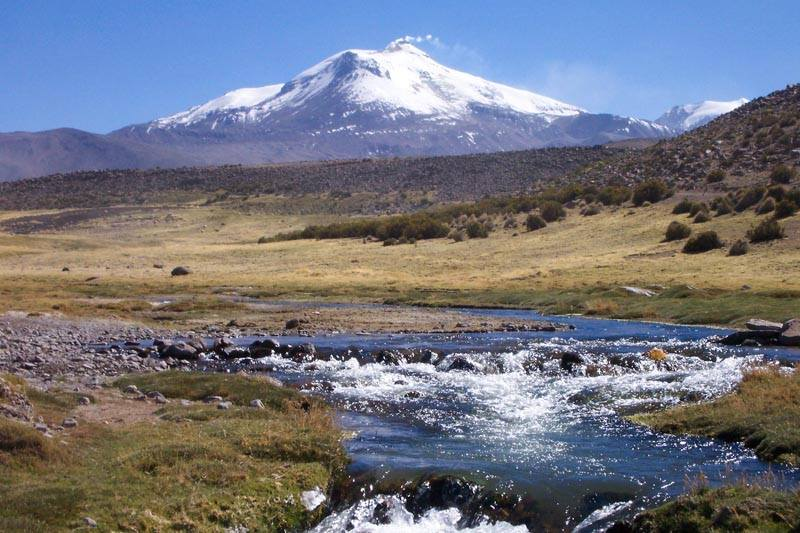 Río Guallatire